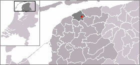 Locatie van Ginnum (Genum) aangegeven binnen de gemeente Ferwerderadiel.